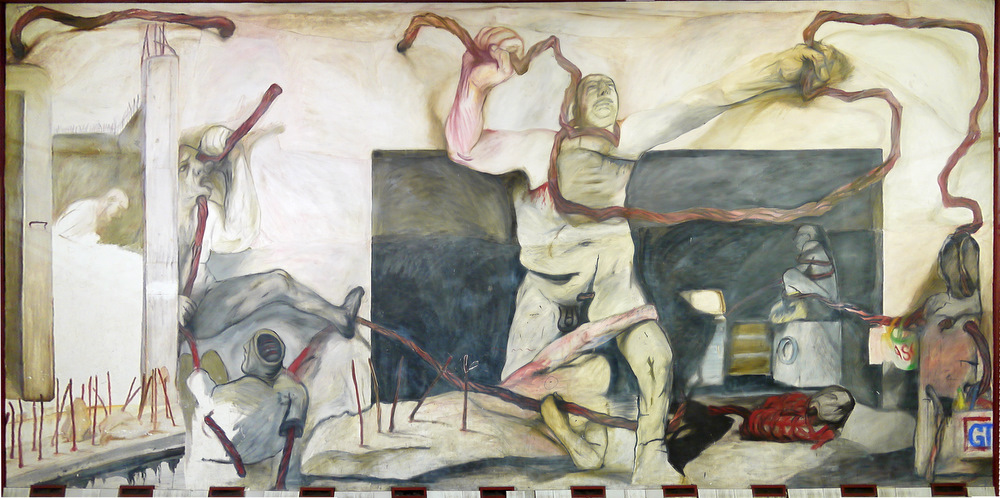 Alterlaa Kunst am Bau Alfred Hrdlicka